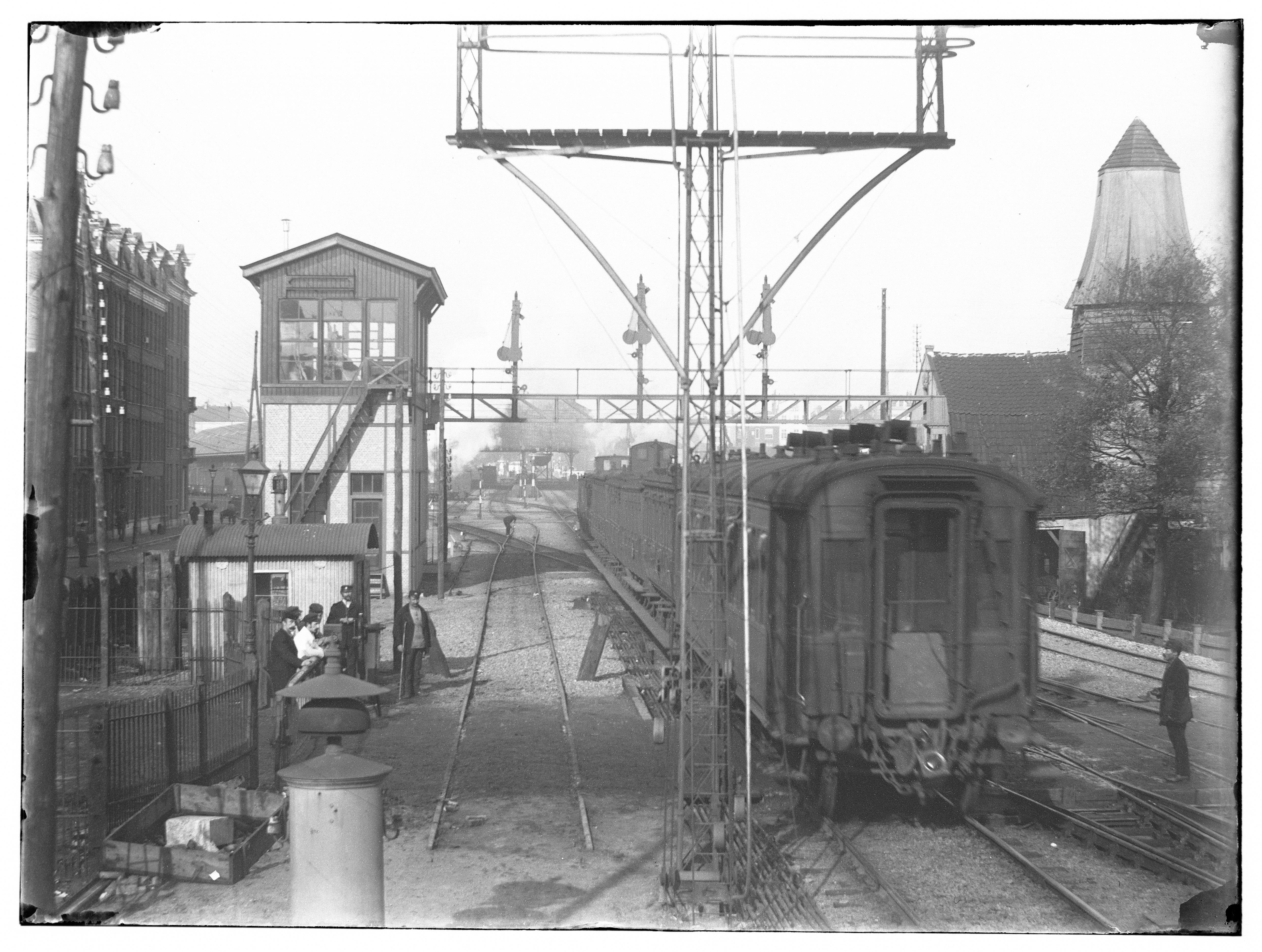 Beschrijving Weesperpoortstation e.o Spoorwegovergang bij de Eerste Oosterparkstraat``, gezien in noordelijke richting naar de overkapping van het Weesperpoortstation. Rechts de cacaomolen van Blooker Cacao``, links huizen aan de Miquelstraat (later Wibautstraat). Op de voorgrond een rijdende trein. Documenttype foto Vervaardiger Olie``, Jacob (1834-1905) Collectie Collectie Jacob Olie Jbz. Datering 30 oktober 1895 Inventarissen Afbeeldingsbestand 010019000824 Generated with Dememorixer